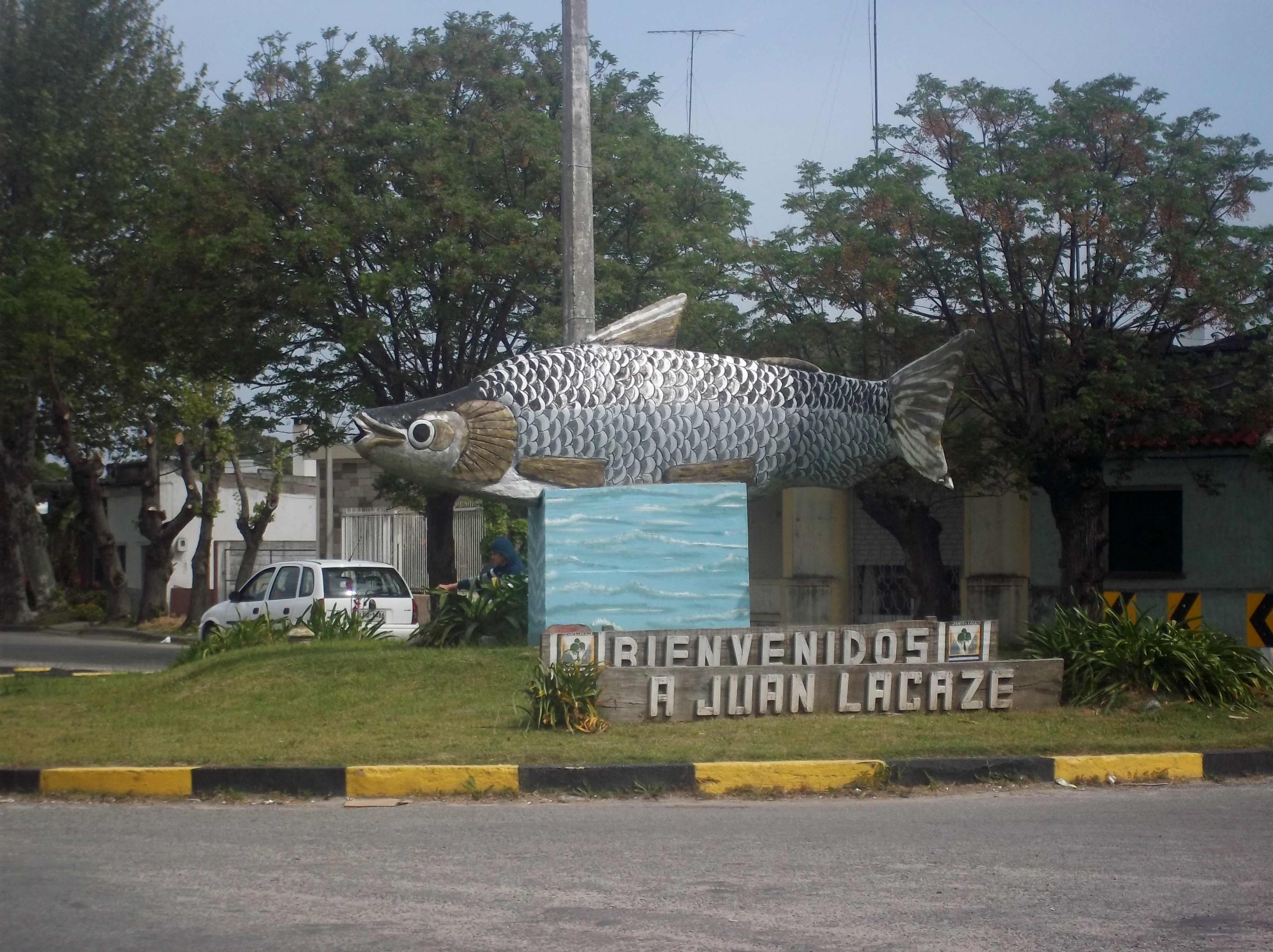 Monumento al Sábalo ubicado a la entrada de Juan Lacaze, obra del escultor Helvecio Olivera.